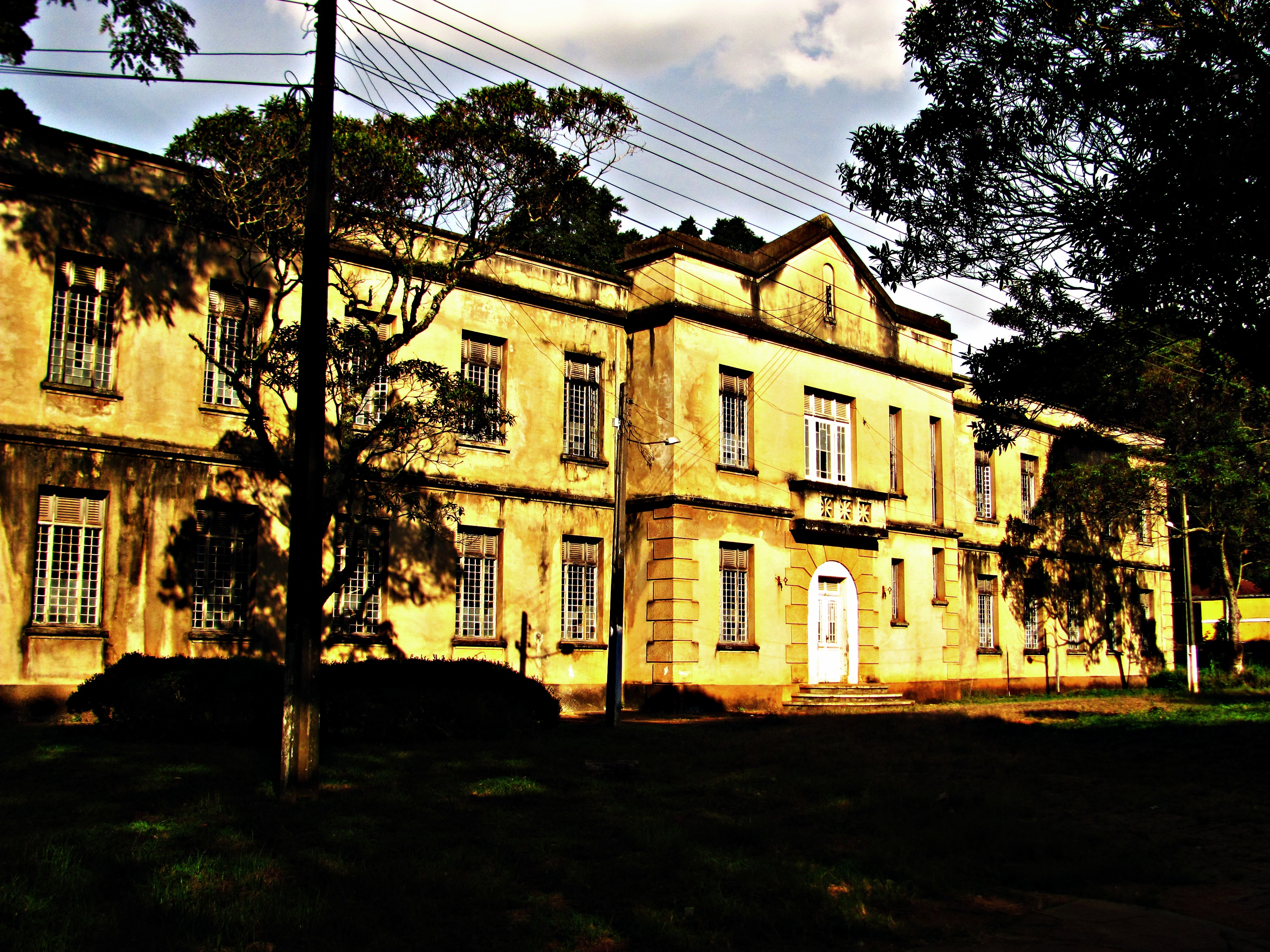 Um dos edifícios do Complexo Hospitalar do Juqueri